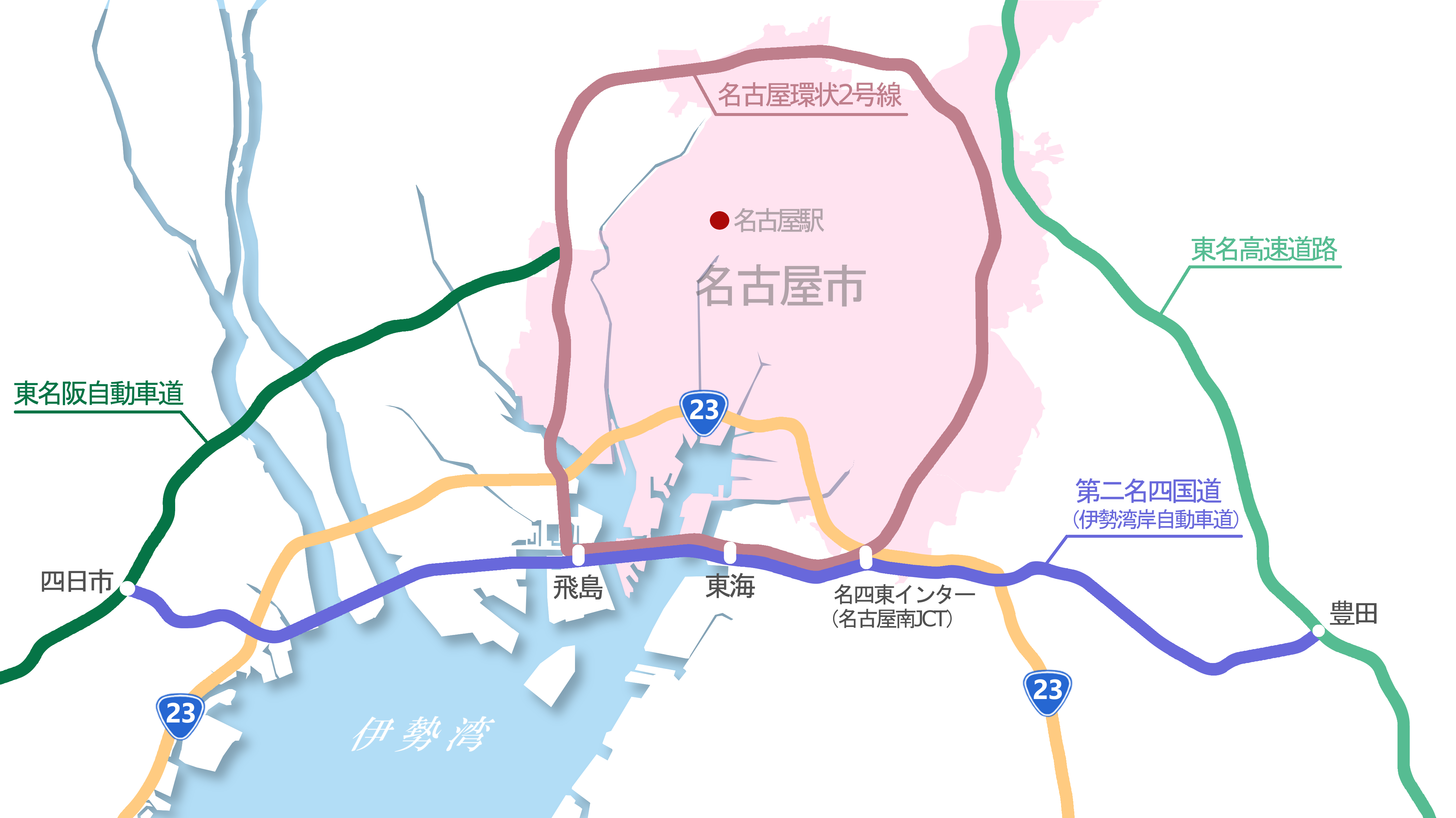 1975年頃の名古屋環状2号線と伊勢湾岸自動車道の構想図